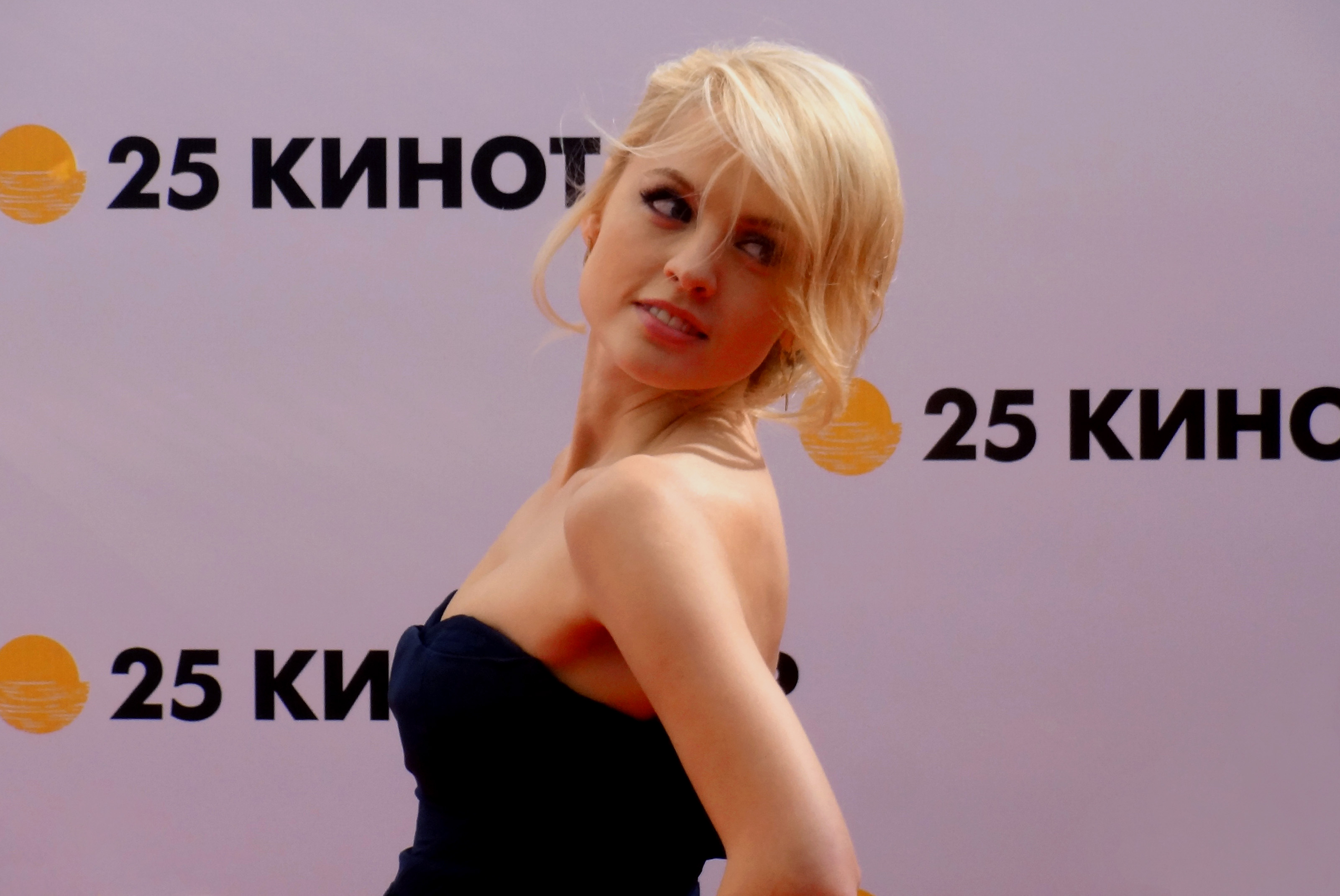 Янина Сергеевна Студилина — российская актриса театра и кино, фотомодель, телеведущая. Церемония открытия фестиваля "Кинотавр -2014" в Сочи.